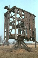 Aufbau und Balkenkonstruktion einer Bockwindmühle